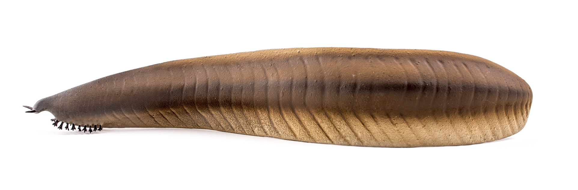 Ricostruzione in scala 4:1.